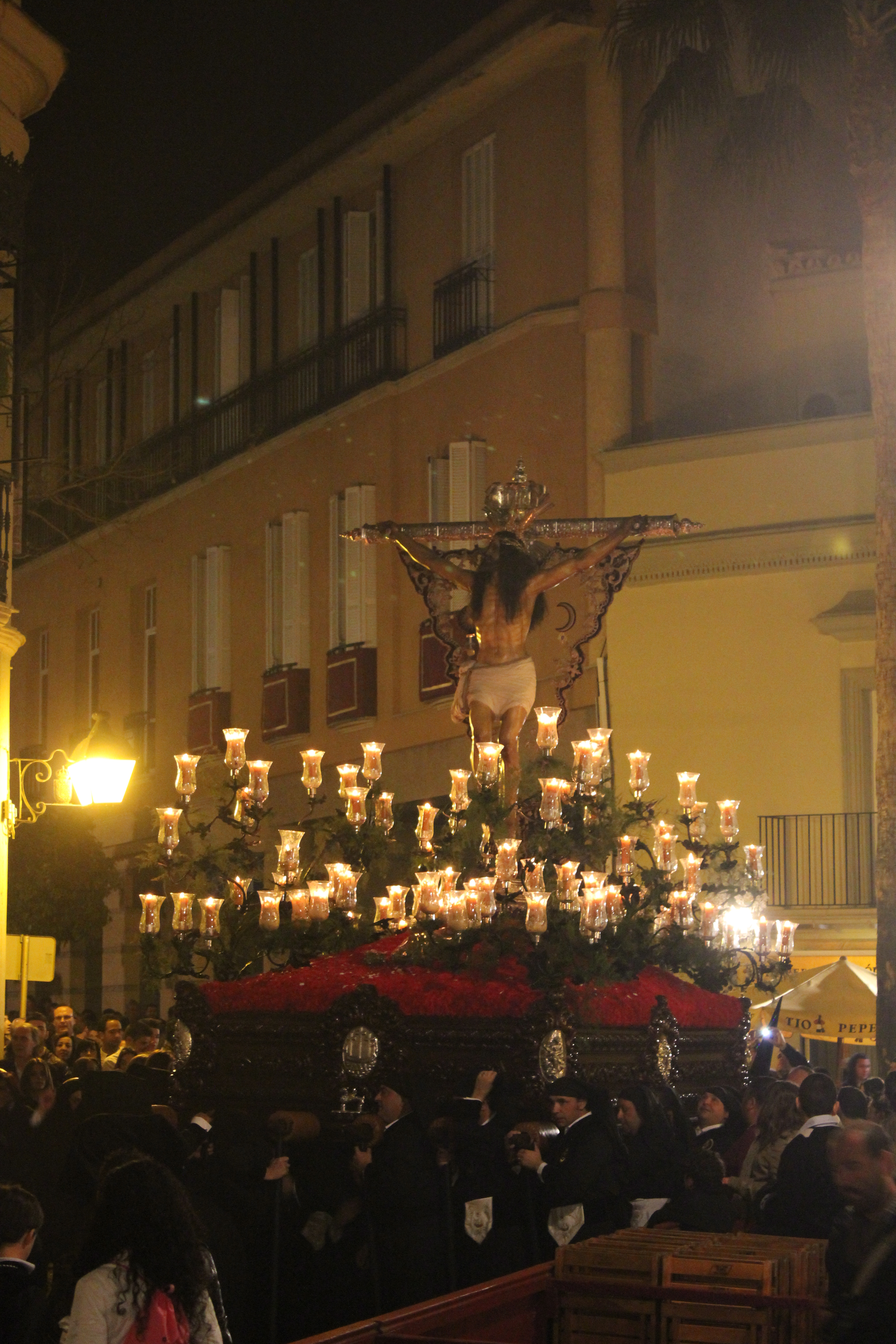 Cristo de la Expiración, Semana Santa Jerez Fra 2012